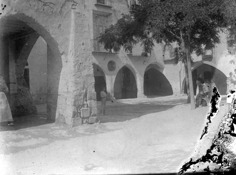 Còpia digital del negatiu original de vidre Llegat Dolors Moros, 2010 Museu d'Art Jaume Morera, Lleida. 2355